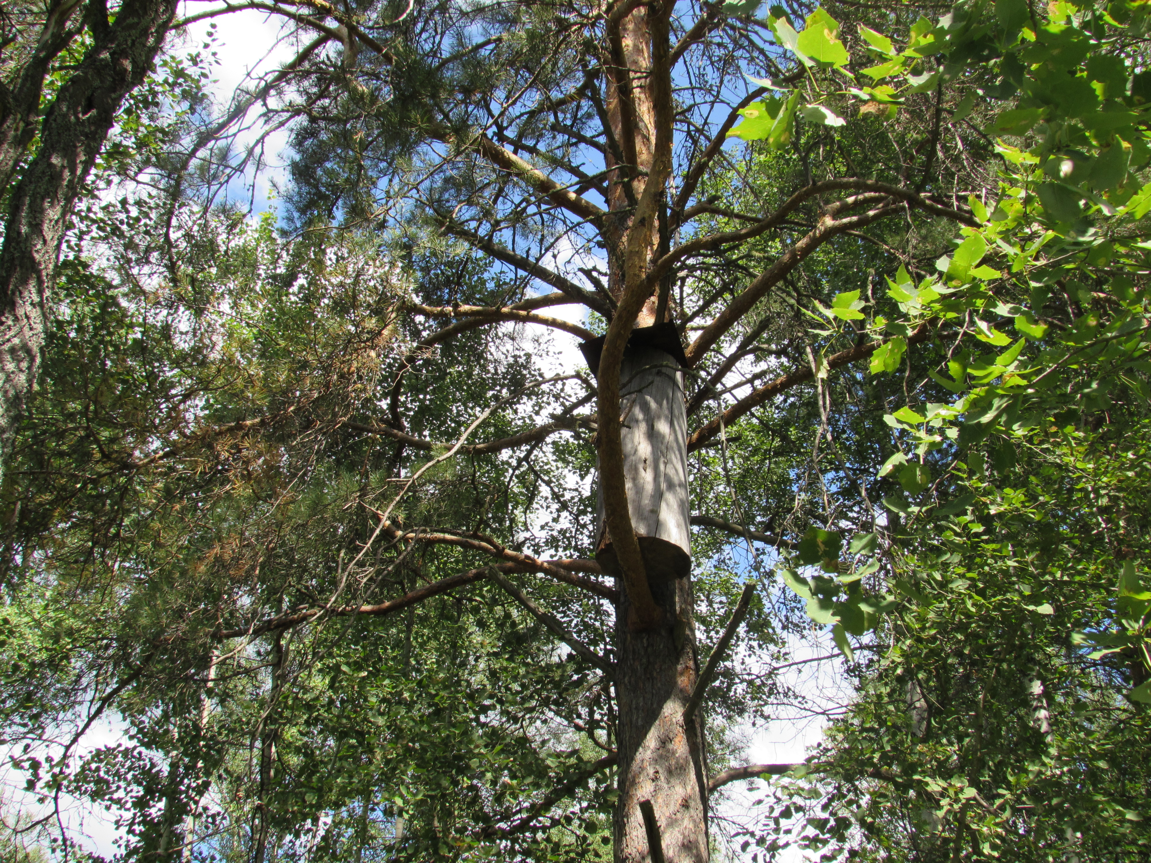 Башҡортса: Башҡорт викимедиасыларының Шүлгәнташҡа сәйәхәте